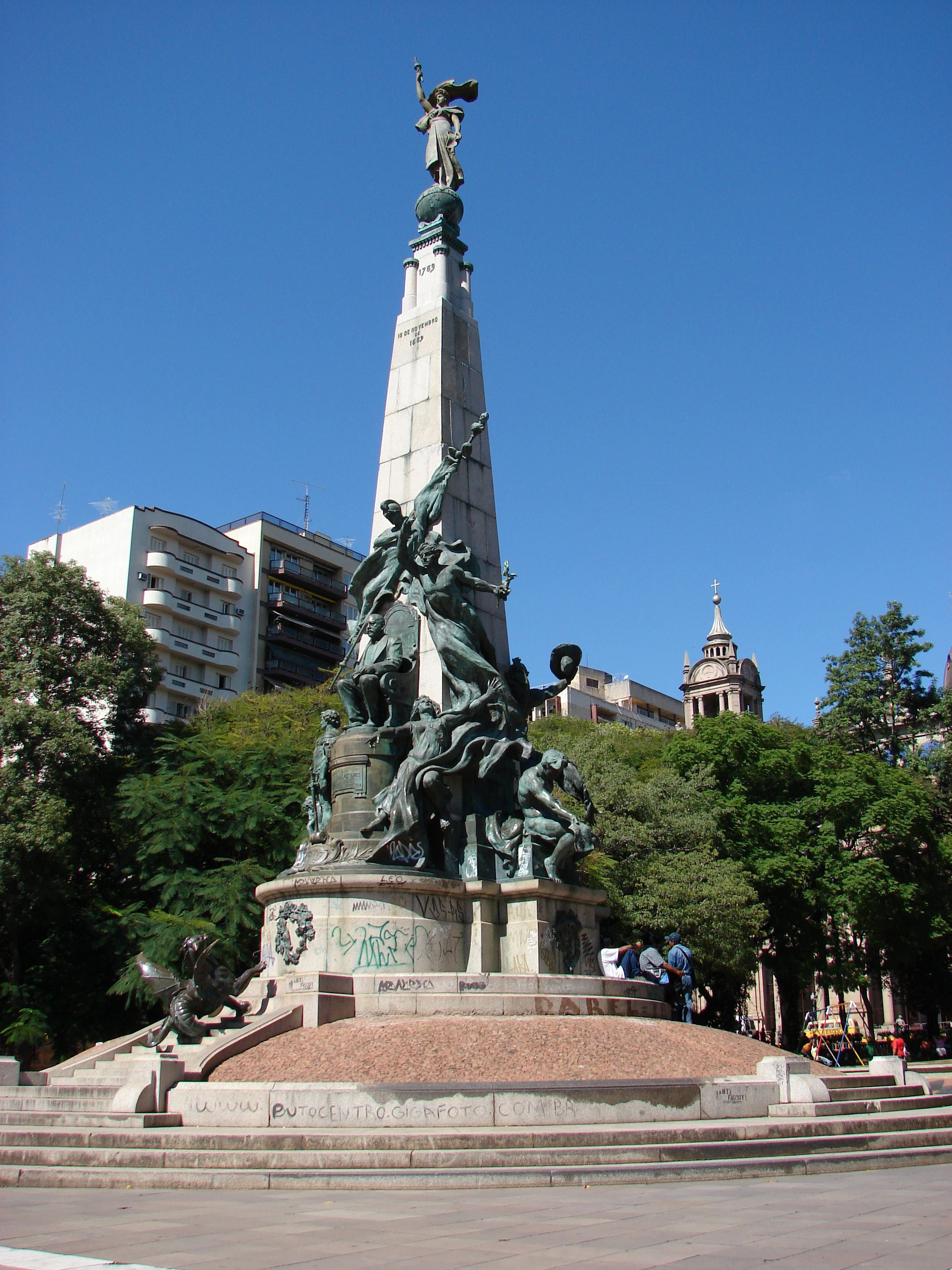 Julio de Castilhos monument in Porto Alegre